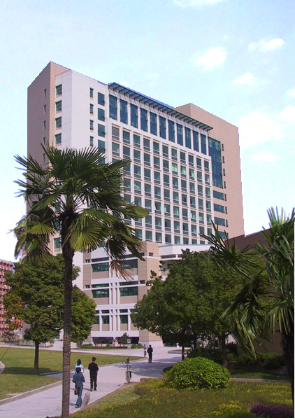 浙江工业大学教学楼